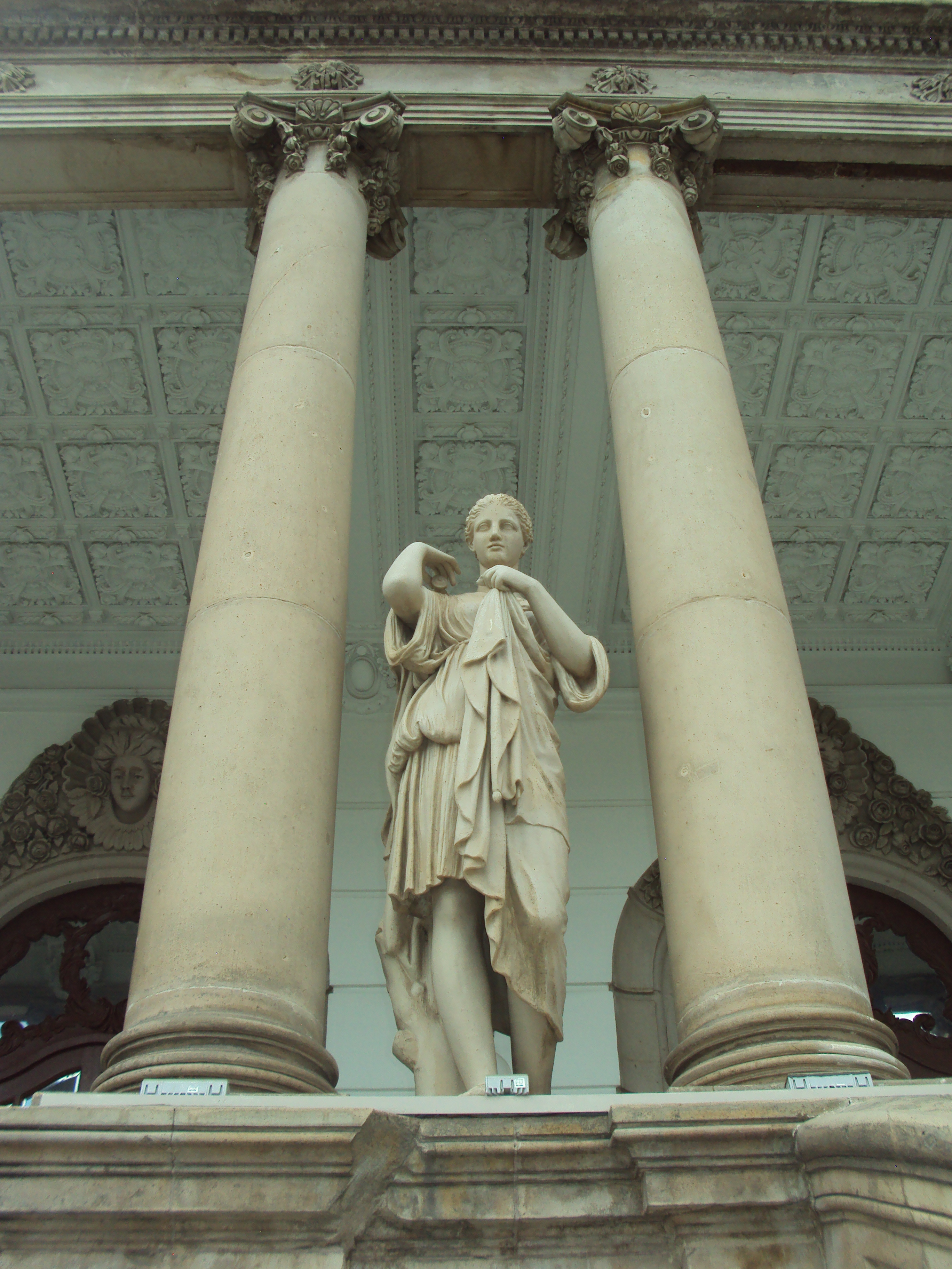 Detalle de una escultura en la fachada de la Quinta Gameros, Centro Cultura de la Universidad Autónoma de Chihuahua